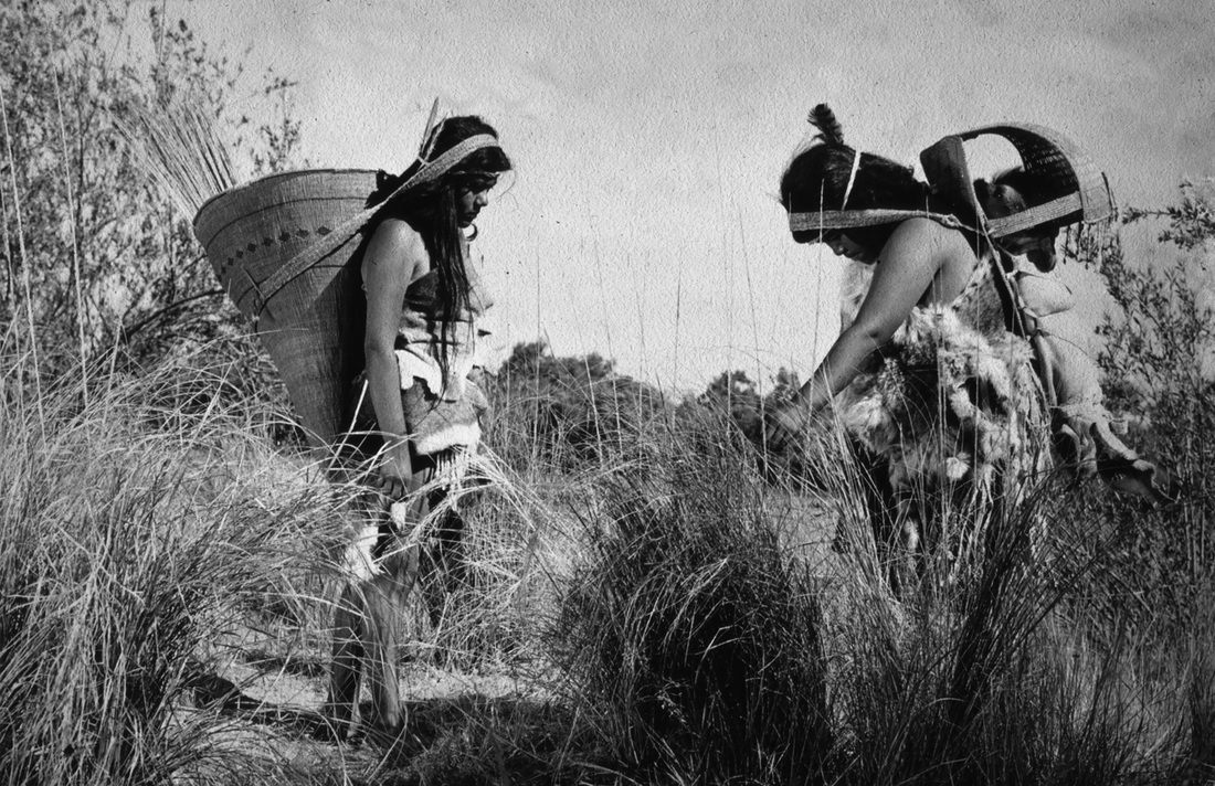 Племе йокути